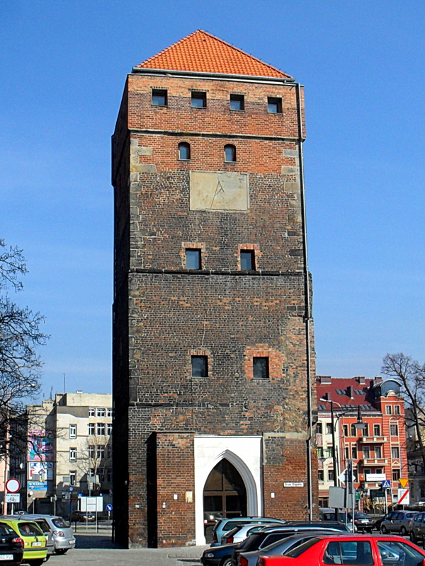 Legnica - Brama Głogowska w zespole dawnych obwarowań miejskich z bramami